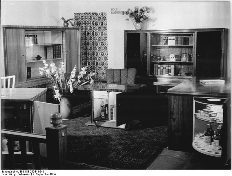 Leipzig, Messe, Herrenzimmer Zentralbild Wittig-Dietzmann Op-Ho. 9.9.1954 Leipziger Messe 1954. Die Holzhadwerksgenossenschaft, Gera, hat im Handelshof einen Stand mit Herrenzimmern. Rechts das Herrenzimmer des Tischlermeisters Pfannenschmidt, Gera, links das Herrenzimmer des Tischlermeisters Albert Krug, Gera.